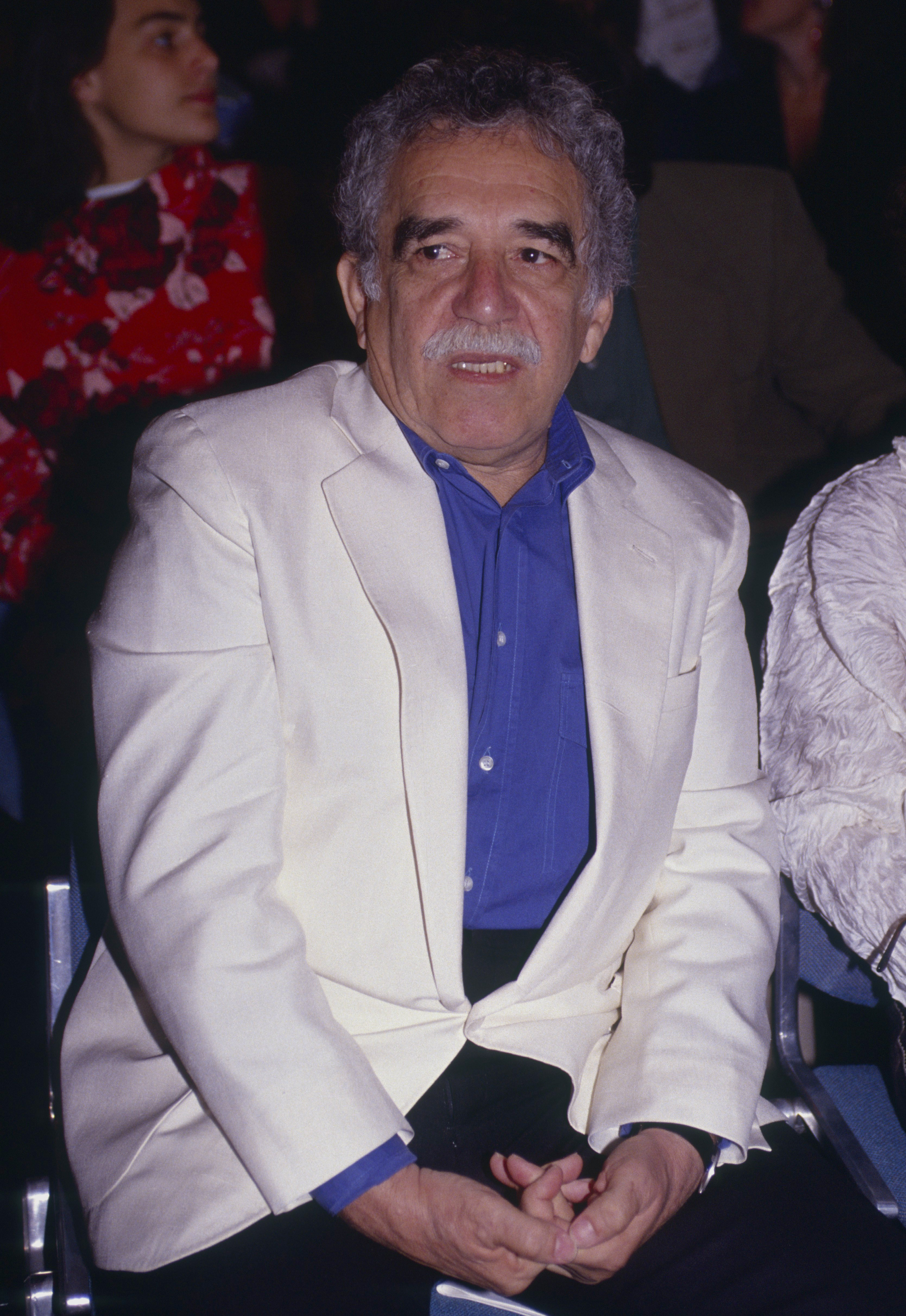 gabriel garcia marquez